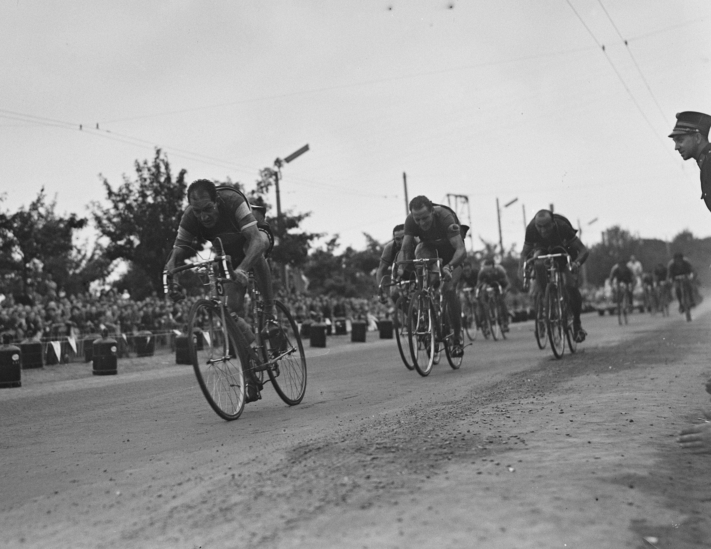 Tour de France. Bartels, Kobbet en Magui.